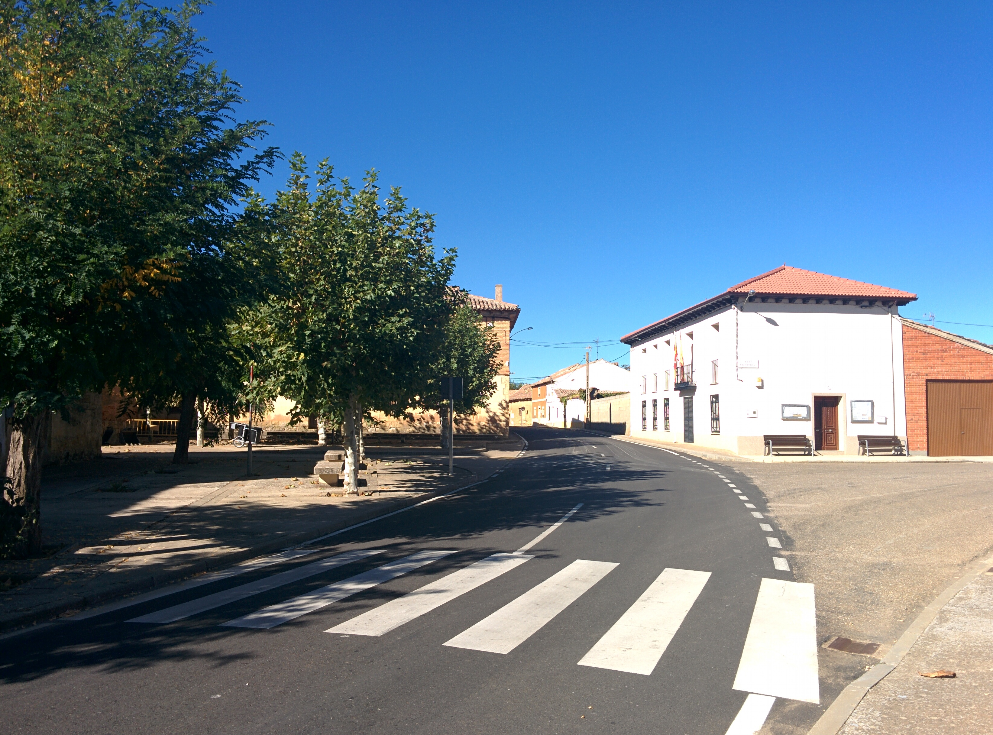 Casa consistorial de Villanueva de los Caballeros (Valladolid, España).